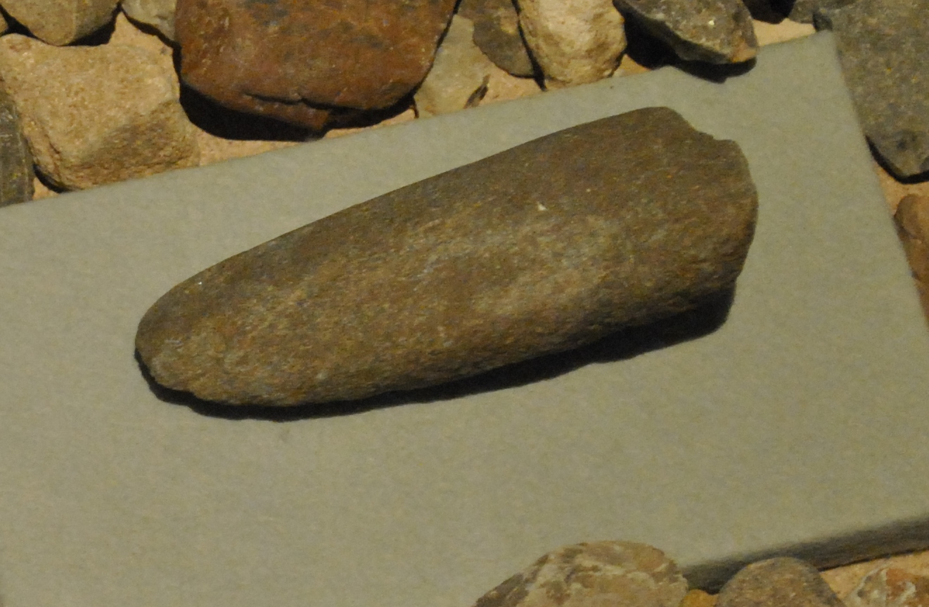 Flachbeil, gefunden in Volkach-Astheim, 4900-2300 v. Chr., Felsgestein oder Amphibolit ohne Durchlöcherung